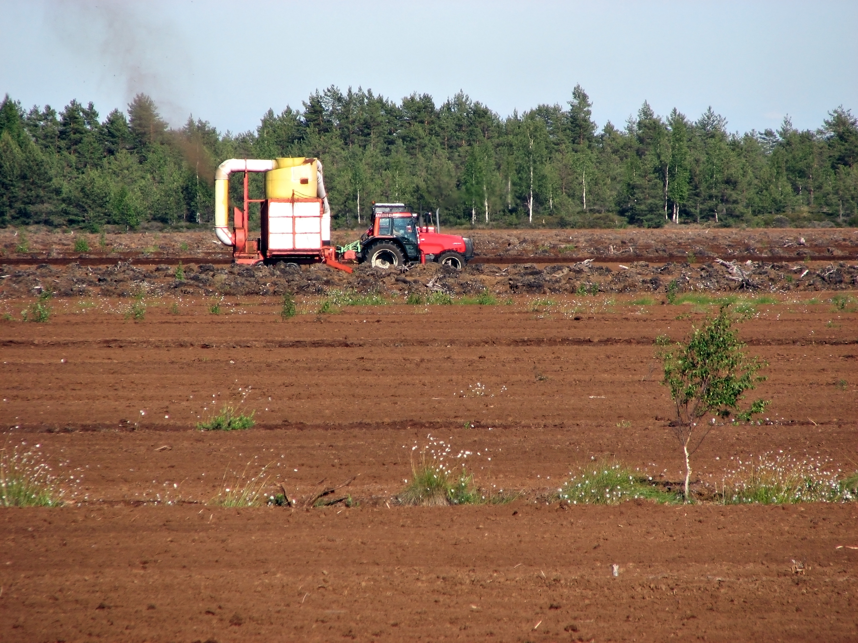 торфяные работы